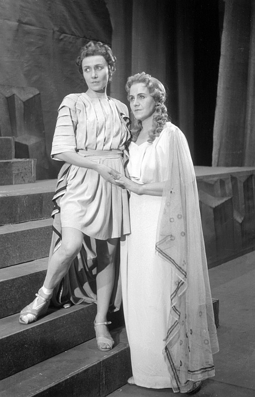 Original image description from the Deutsche Fotothek Schluss-Szene und Rollenporträts, Anneliese Müller als Orpheus und Tiana Lemnitz als Eurydike